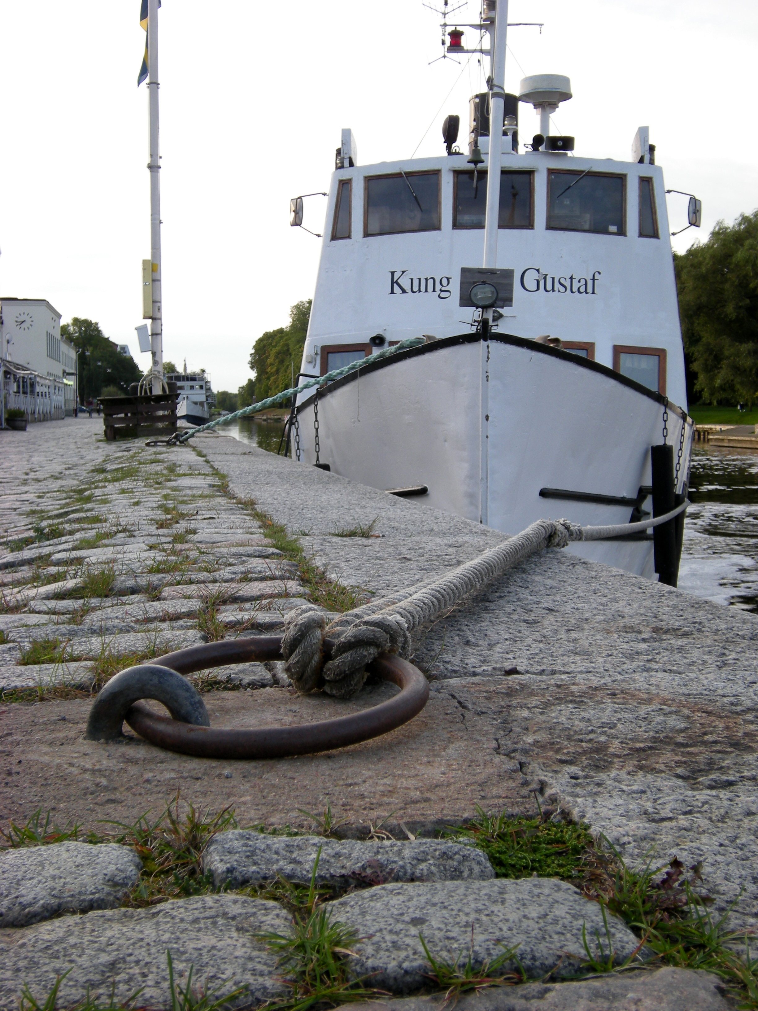 M/S Kung Carl Gustaf vid kaj i Uppsala, Fyrisån.